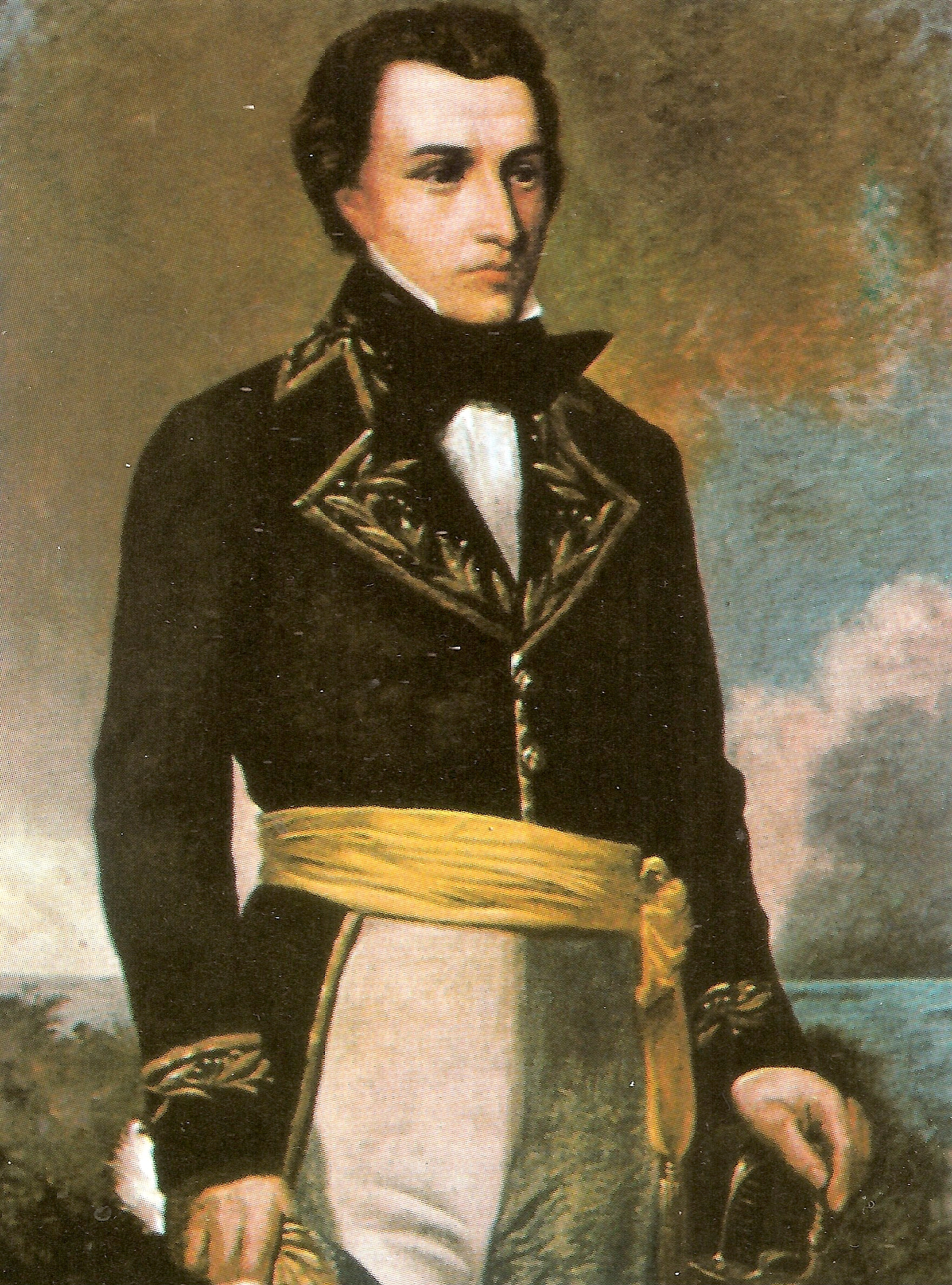 Manuel Carlos Piar. Obra de Pablo W. Hernández. Oleo sobre tela locaclizado en el Palacio Federal en Caracas - Venezuela